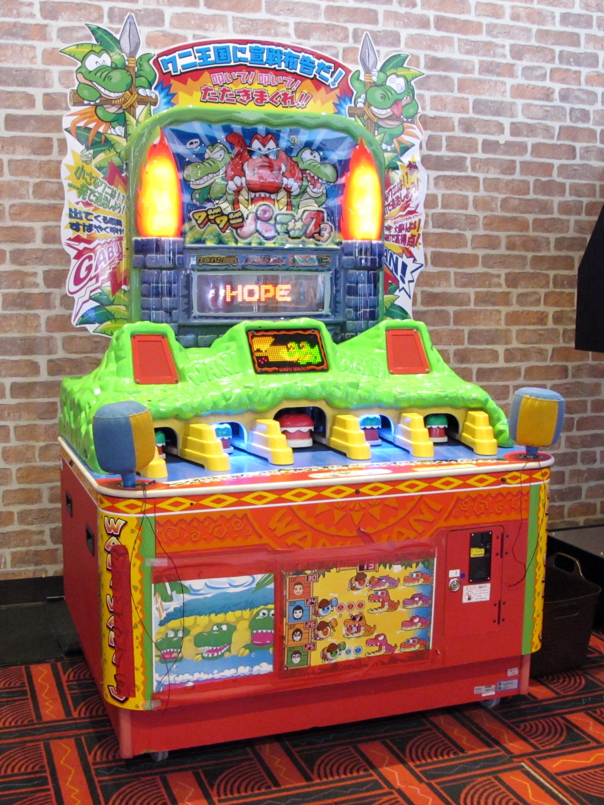 『ワニワニパニック3』（ホープ）のアーケードゲーム筐体。タイトーステーション・イオンタウン水戸南店にて。 Canon PowerShot G11